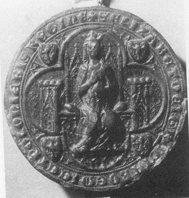 Siegel - Ryksa Elizabeth